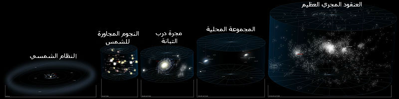 رسم يُظهر النظام الشمسي والمجرة بجانب الكون، حيث يَبدأ من النظام الشمسي، ثم يُظهره بجانب النجوم المجاورة للشمس، ثم يُظهرهم بجانب مجرة درب التبانة، ثم المجرة نفسها والمجموعة المحلية، وفي النهاية العنقود المجري العظيم الذي تقع مجرتنا ضمنه.